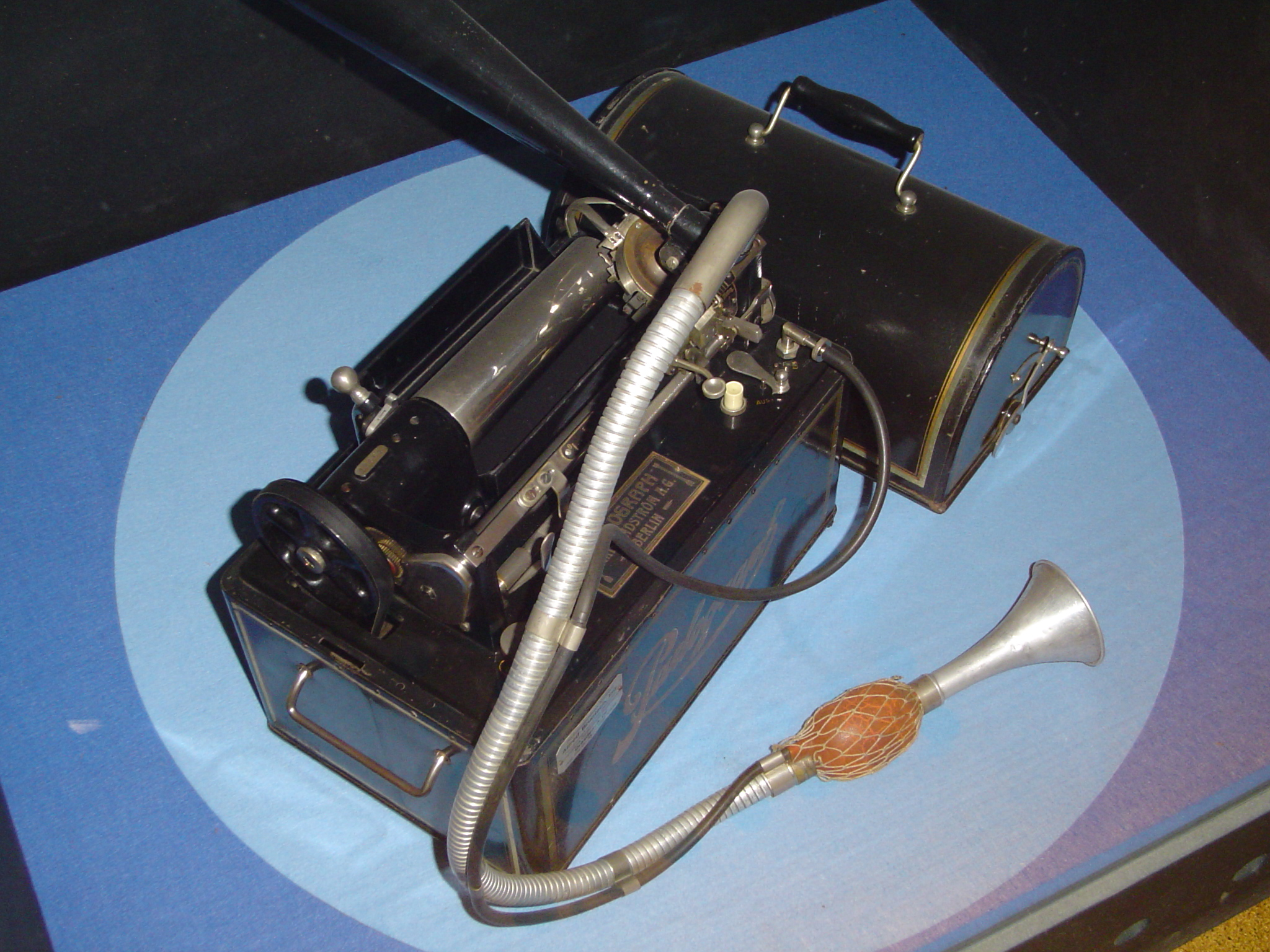 Diktiergerät mit el. Antrieb, Hörtrichter und pneum. Schaltung